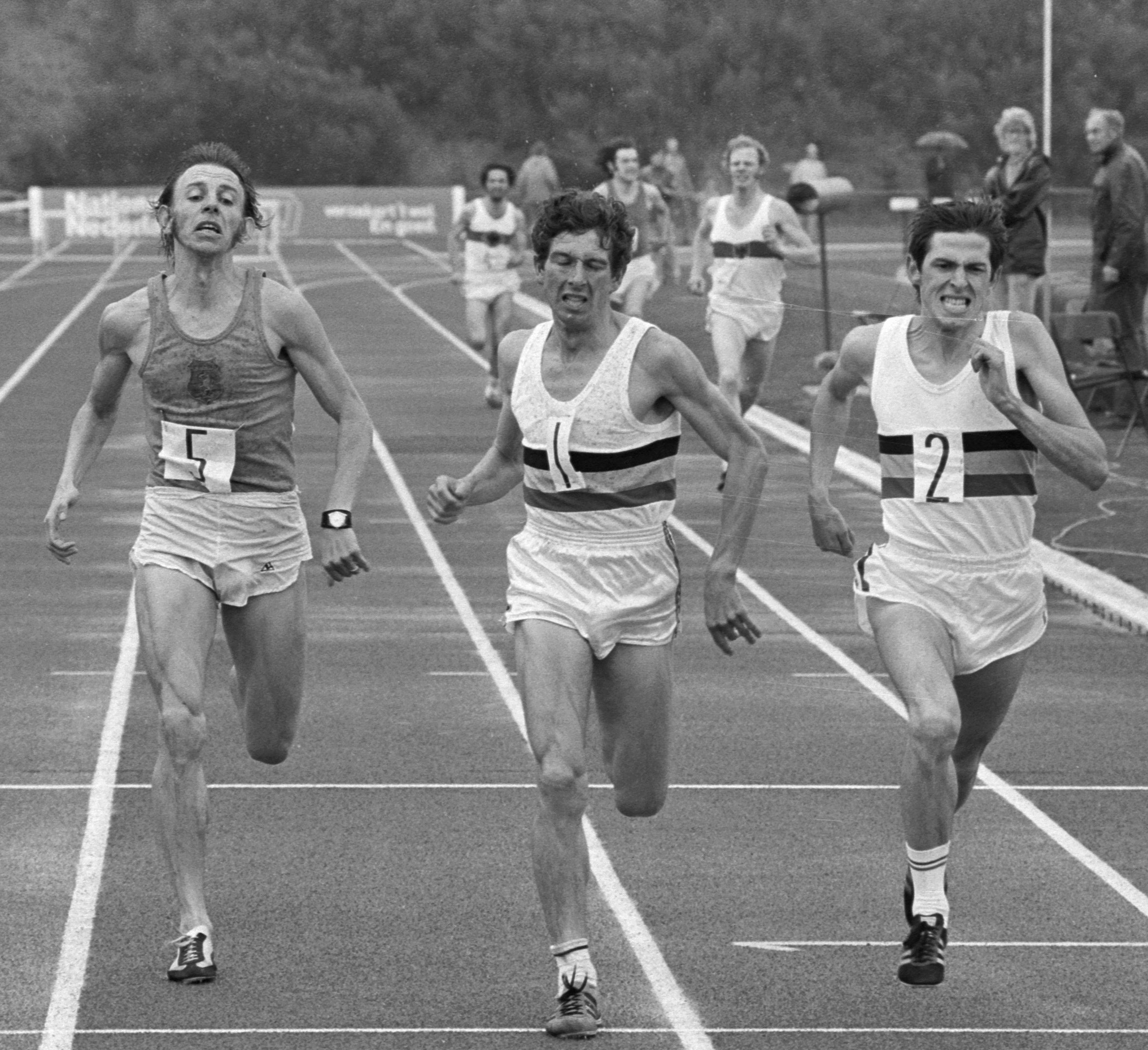 Atletiekinterland Nederland, Duitsland B, Belgie op Papendal; finish 1500 meter v.l.n.r. Haico Scharn (3), Emile Puttemans (1e) en Van Mullem (2e) )